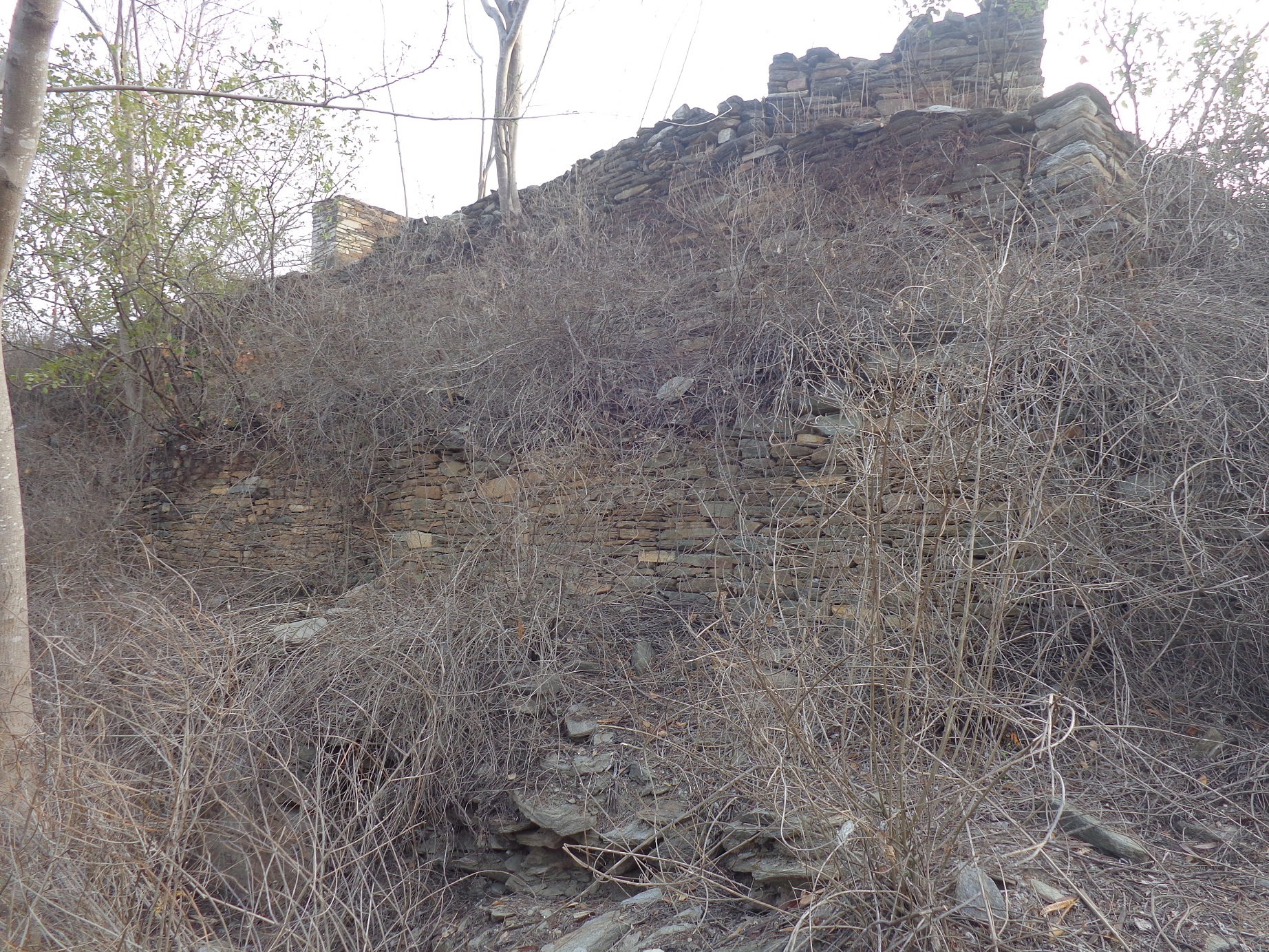 नेपाल भाषा: Doti Raikaa Raja kot-1